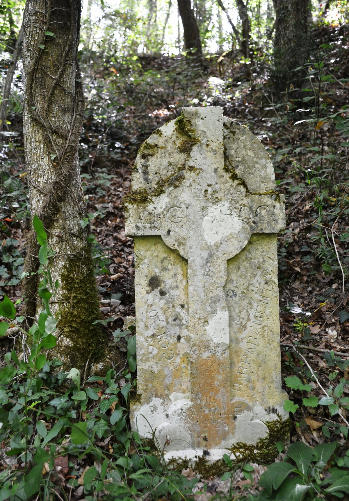 Lapide di Luigi Brogi (San Giovanni a Cerreto)